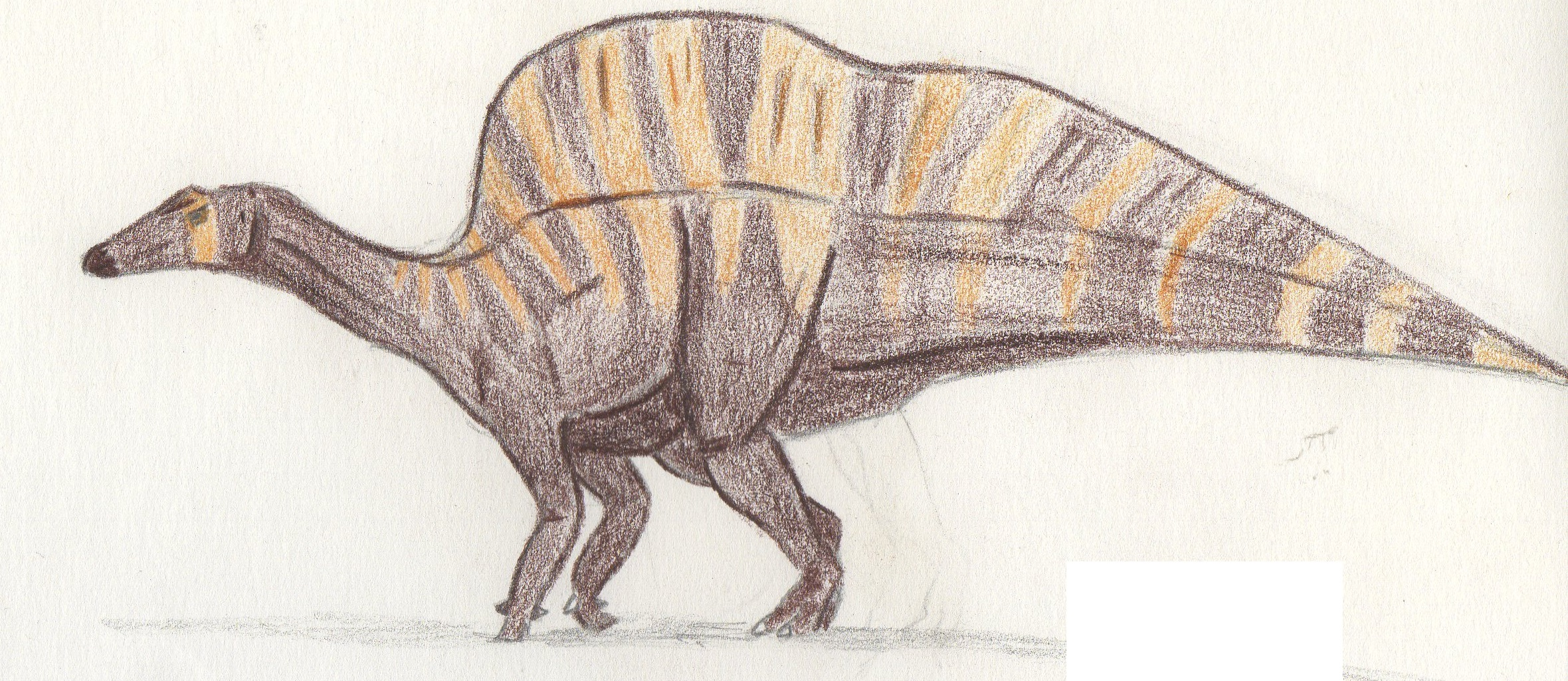 Ouranosaurus nigeriensis